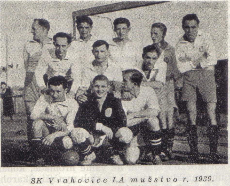 fotbalové mužstvo